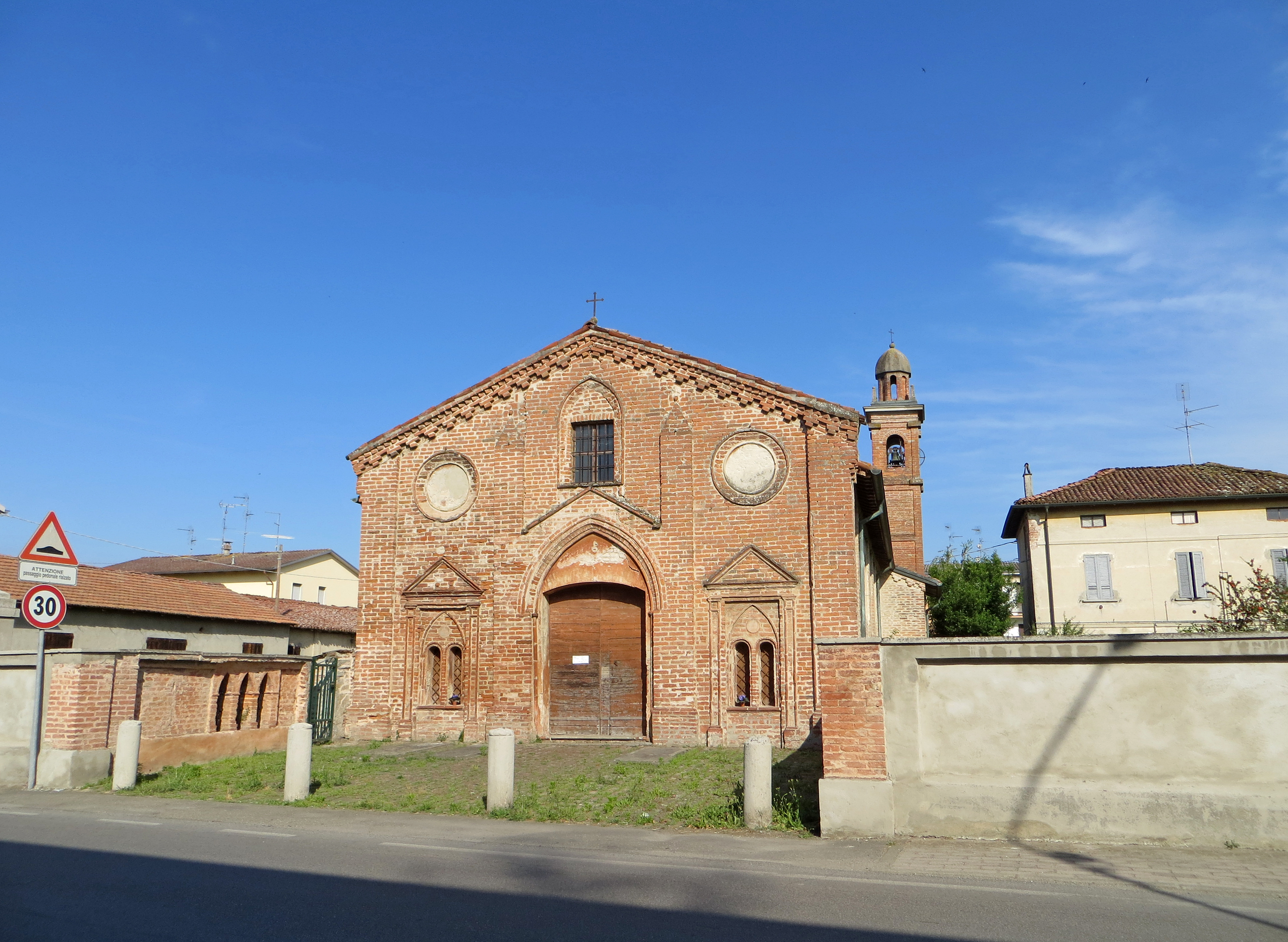 Chiesetta della Beata Vergine delle Grazie (Zibello) - facciata